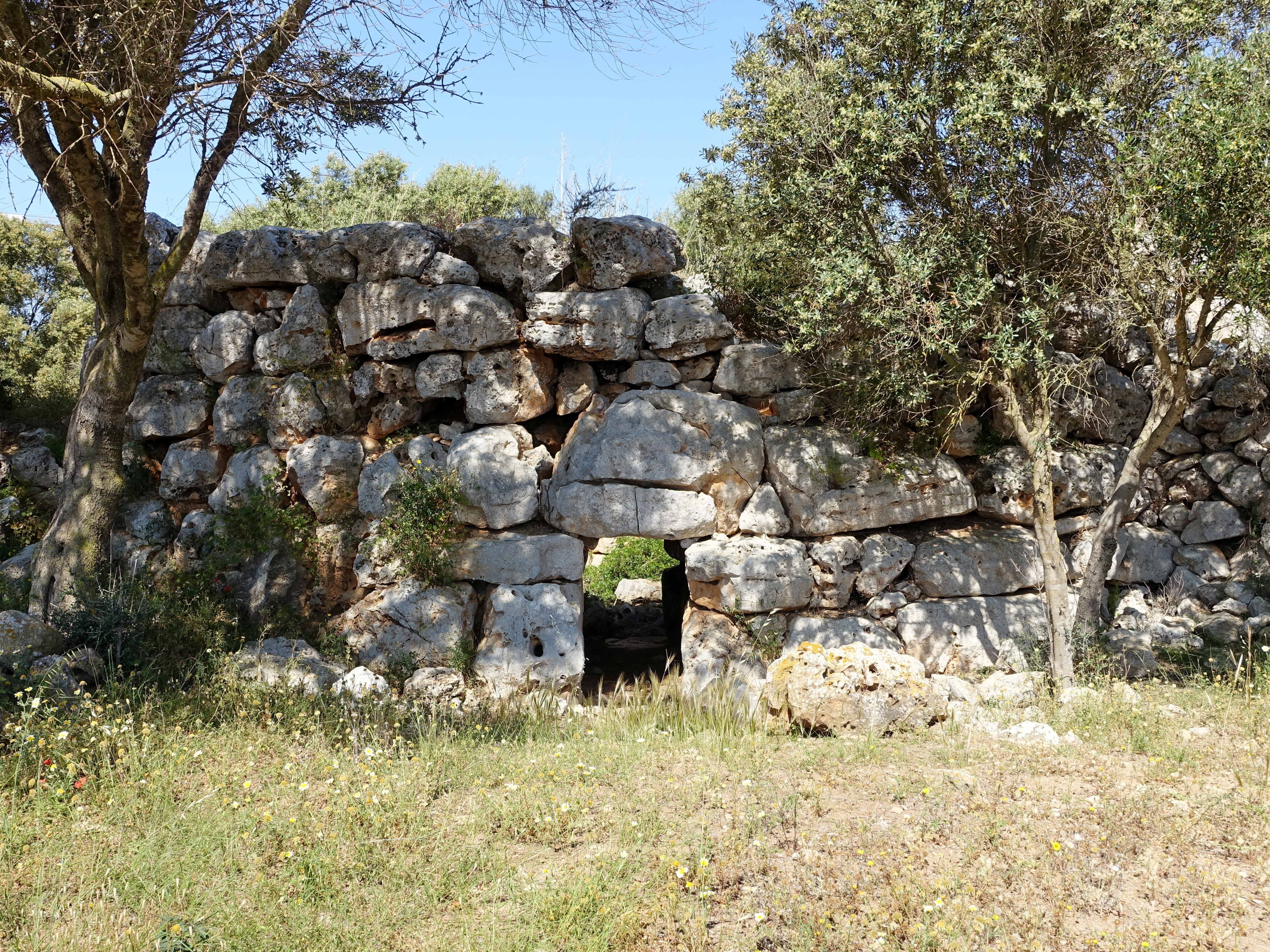 Runder Talaiot Joana der talaiotischen Siedlung es Antigors in der Gemeinde Ses Salines, Mallorca, Spanien